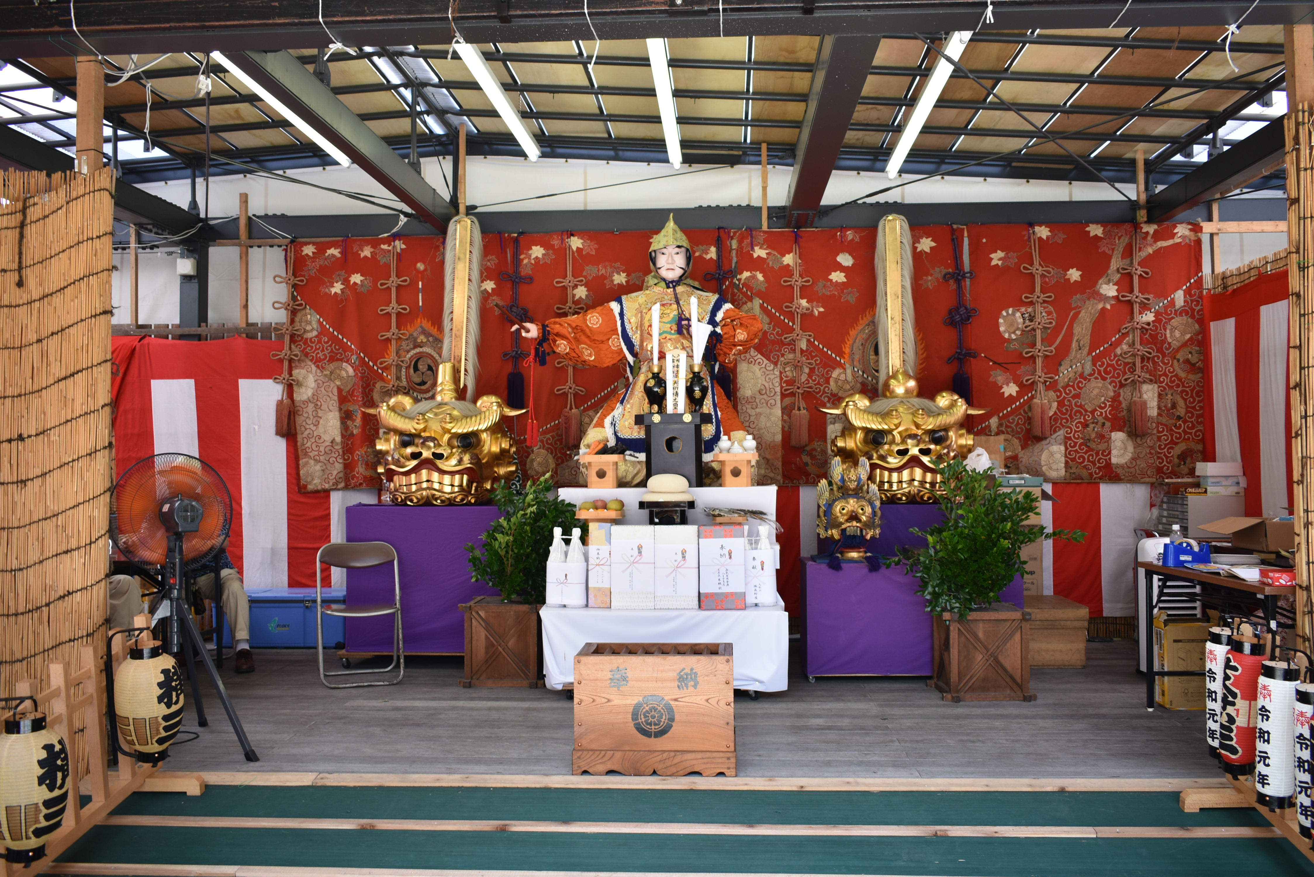 八王子まつり